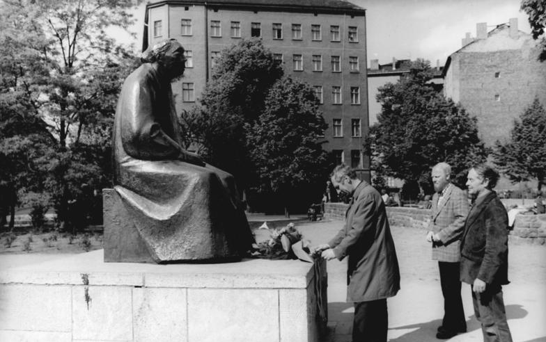 ADN-ZB-Sturm-24. 5. 1974-Berlin: Kranzniederlegungen Bildender Künstler. Delegierte des VII. Kongresses des Verbandes Bildender Künstler der DDR, der am 28. 5. 1974 in Karl-Marx-Stadt beginnt, legten am 24. 5. 1974 an Berliner Gedenkstätten und Gräbern hervorragender Künstlerpersönlichkeiten Kränze nieder. Am Käthe-Kollwitz-Denkmal (Prenzlauer Berg) fanden sich zum ehrenden Gedenken der Bildhauer Werner Richter, der Maler Ronald Paris und der Bildhauer René Grätz (v. l. n. r. ) ein. Anmerkung: Das Kollwitz-Denkmal ist ein Werk des Bildhauers Gustav Seitz, der in der ADN-Fotobeschreibung unerwähnt blieb.